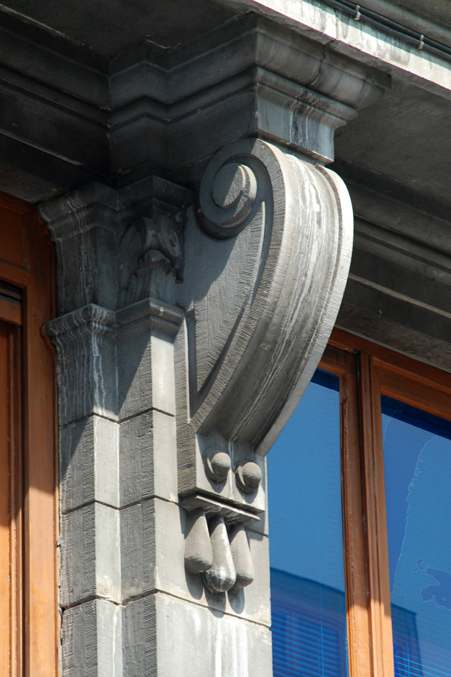 Belgique - Bruxelles - Immeuble « Le Printemps »